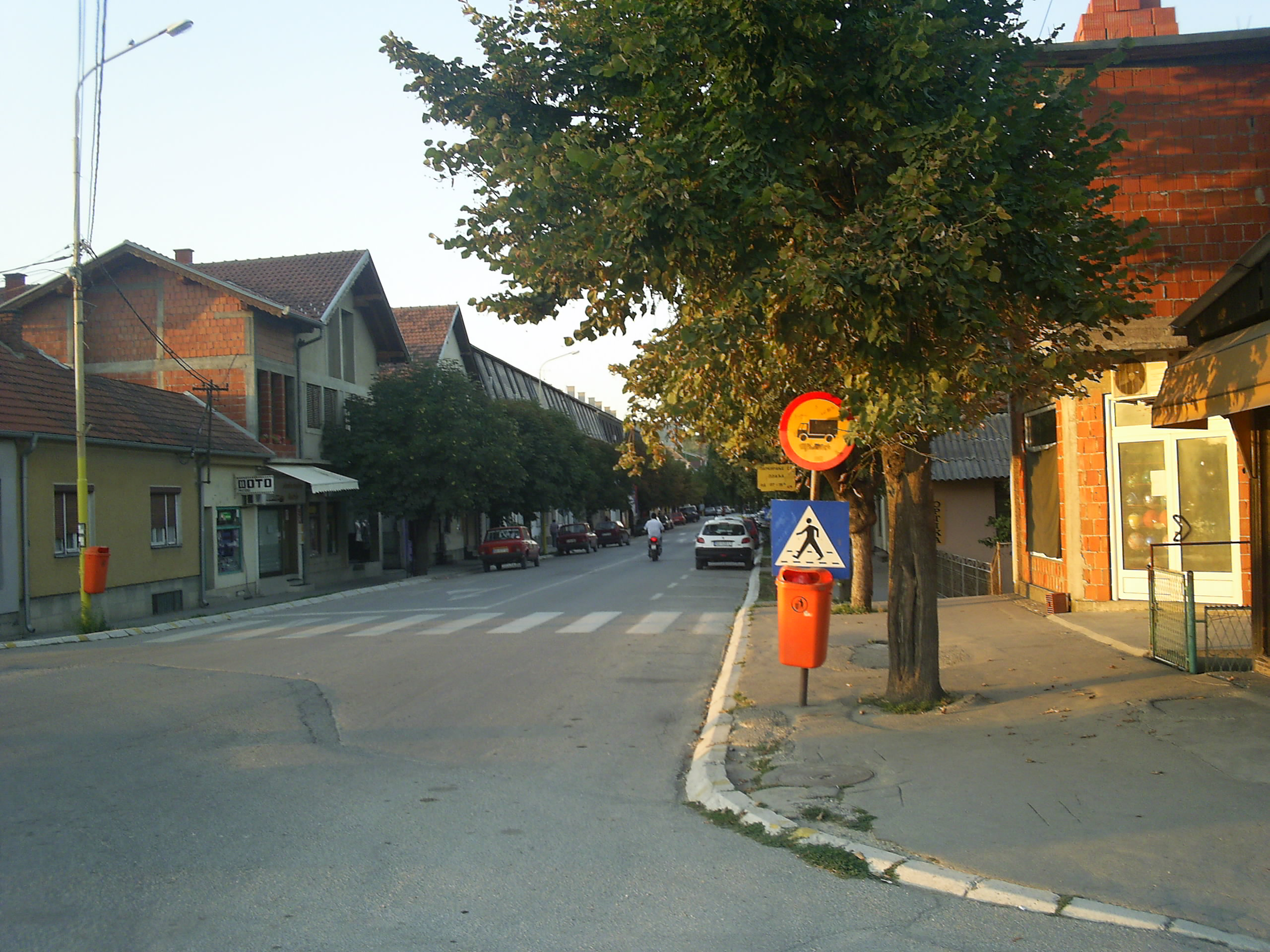 Улица Краља Петра I у Баточини